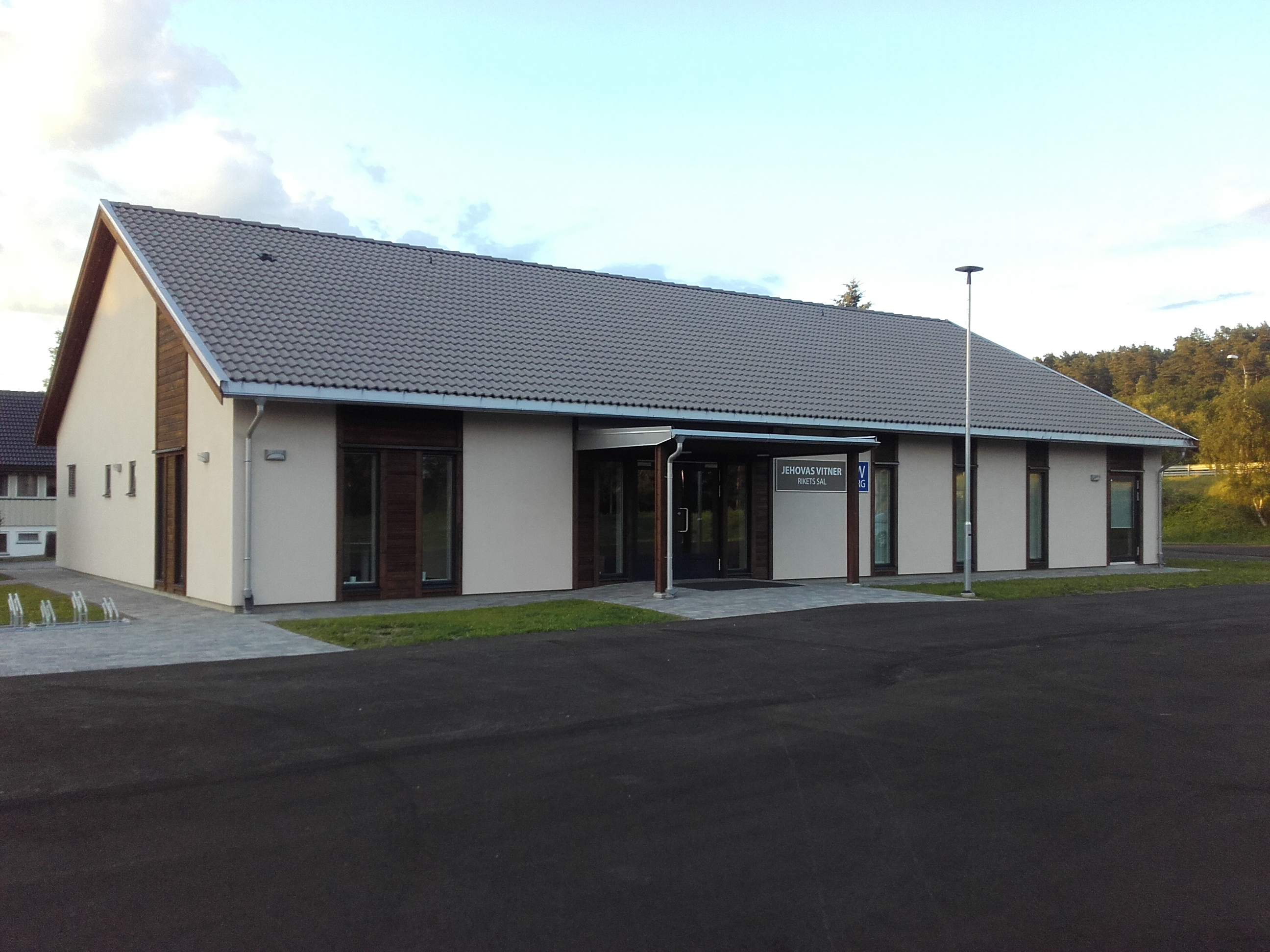 Dette er Jehovas vitners Rikets sal i Larvik.